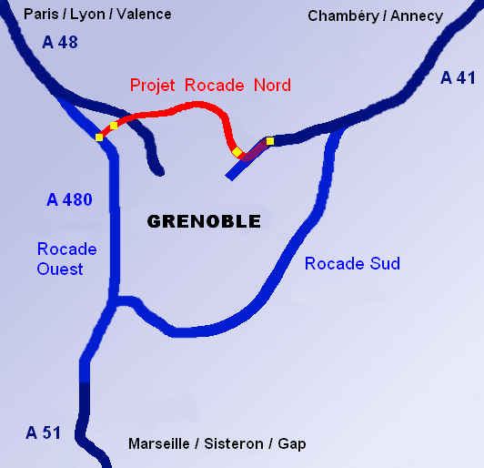 Projet de rocade autoroutière Nord à Grenoble avec ses échangeurs